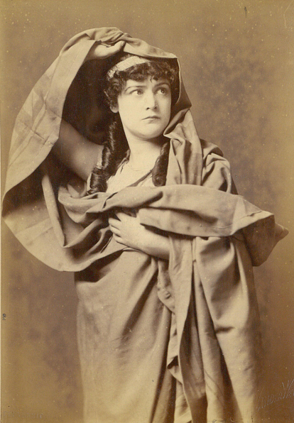 Henry Van der Weyde. Dorothy Dene as Cassandra